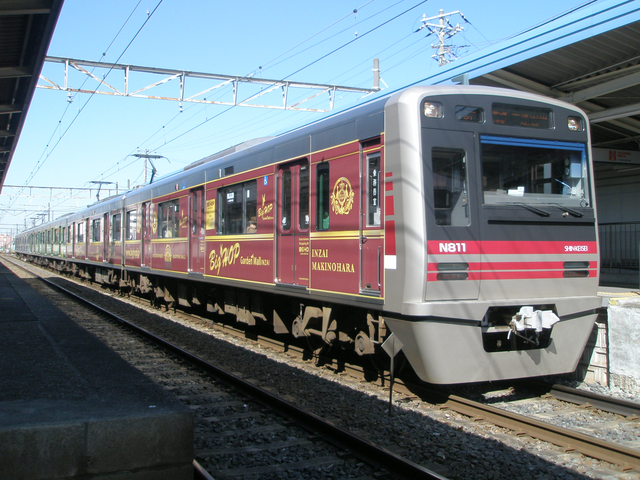 新京成電鉄N800形、BIG HOPガーデンモール印西の広告ラッピング編成、2008年2月18日、京成千葉線みどり台にて